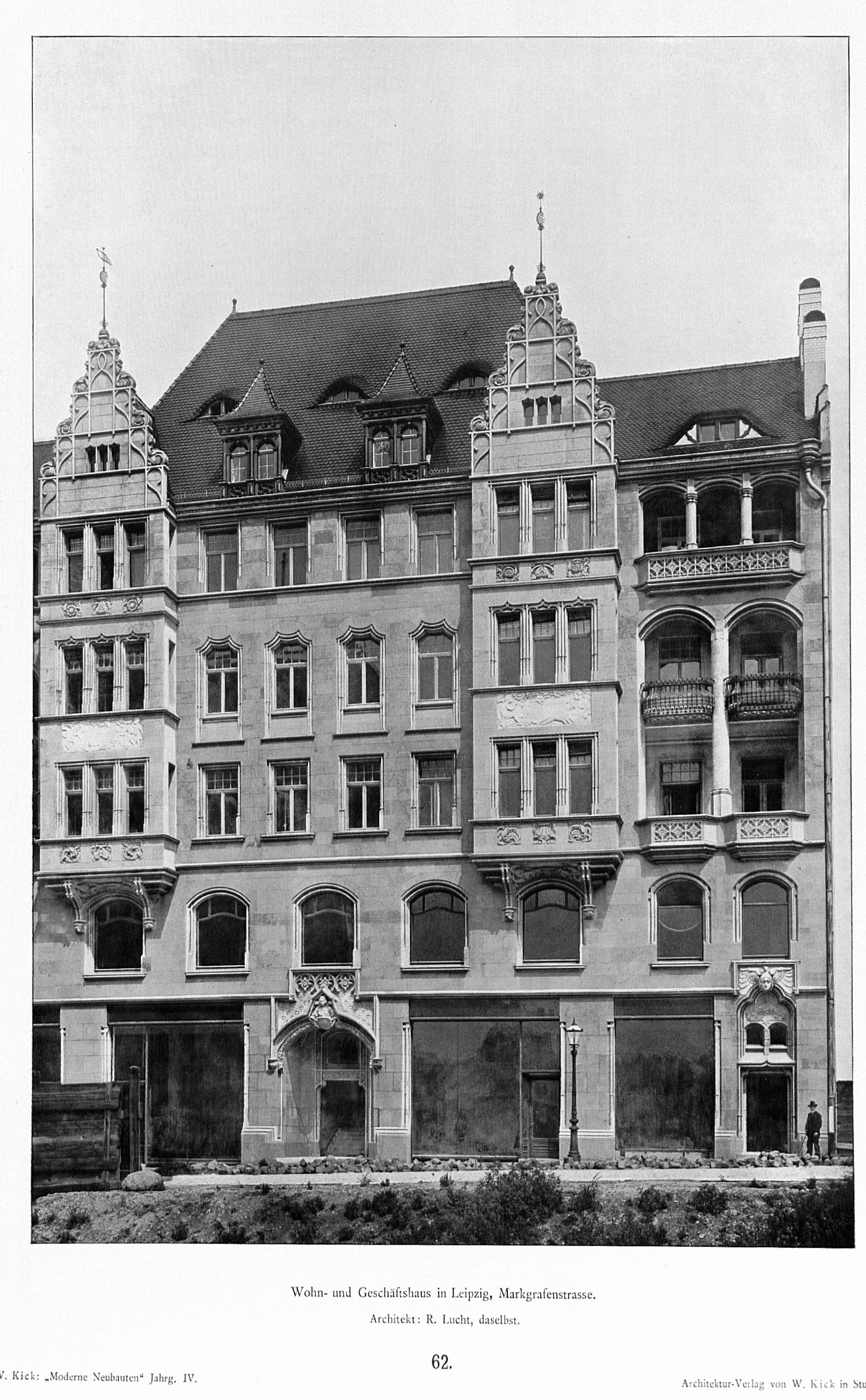 Wohn- und Geschäftshaus Markgrafenstraße 10 in Leipzig; Architekt: Richard Lucht; erbaut 1900-1901, unter Denkmalschutz